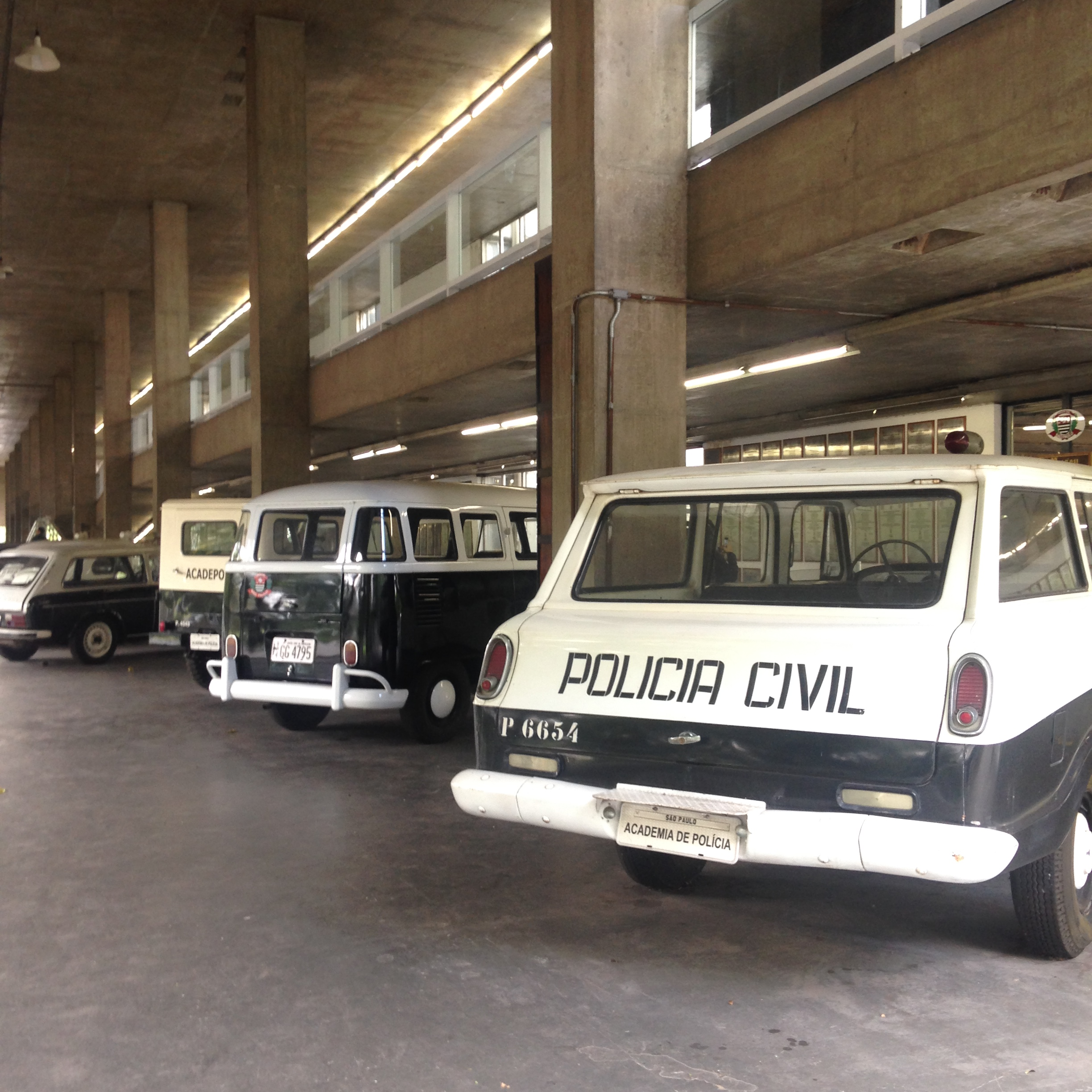 Evolução gradual das viaturas.